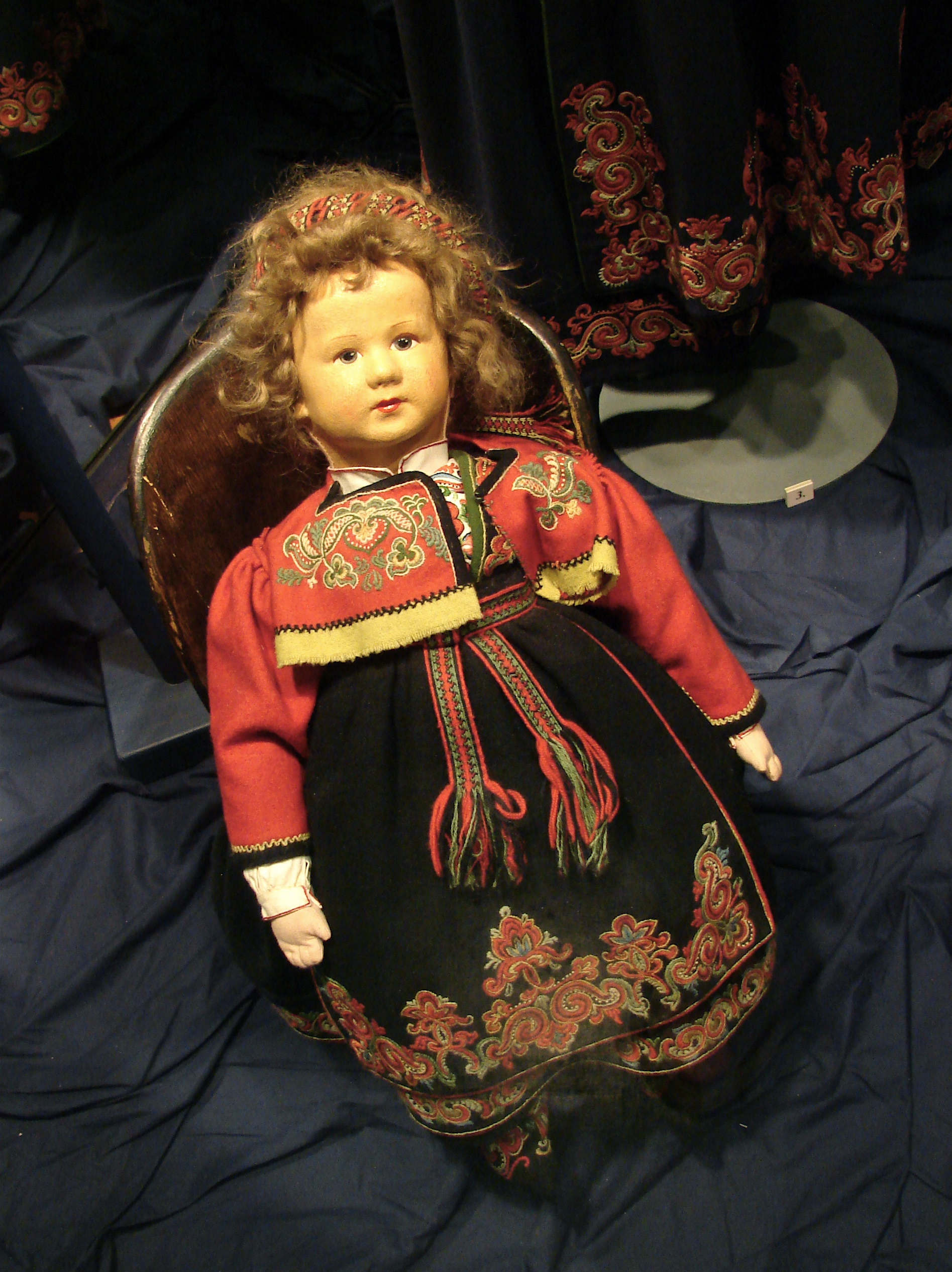 Dukke med bunad fra Øst-Telemark, Telemark Museum, Skien